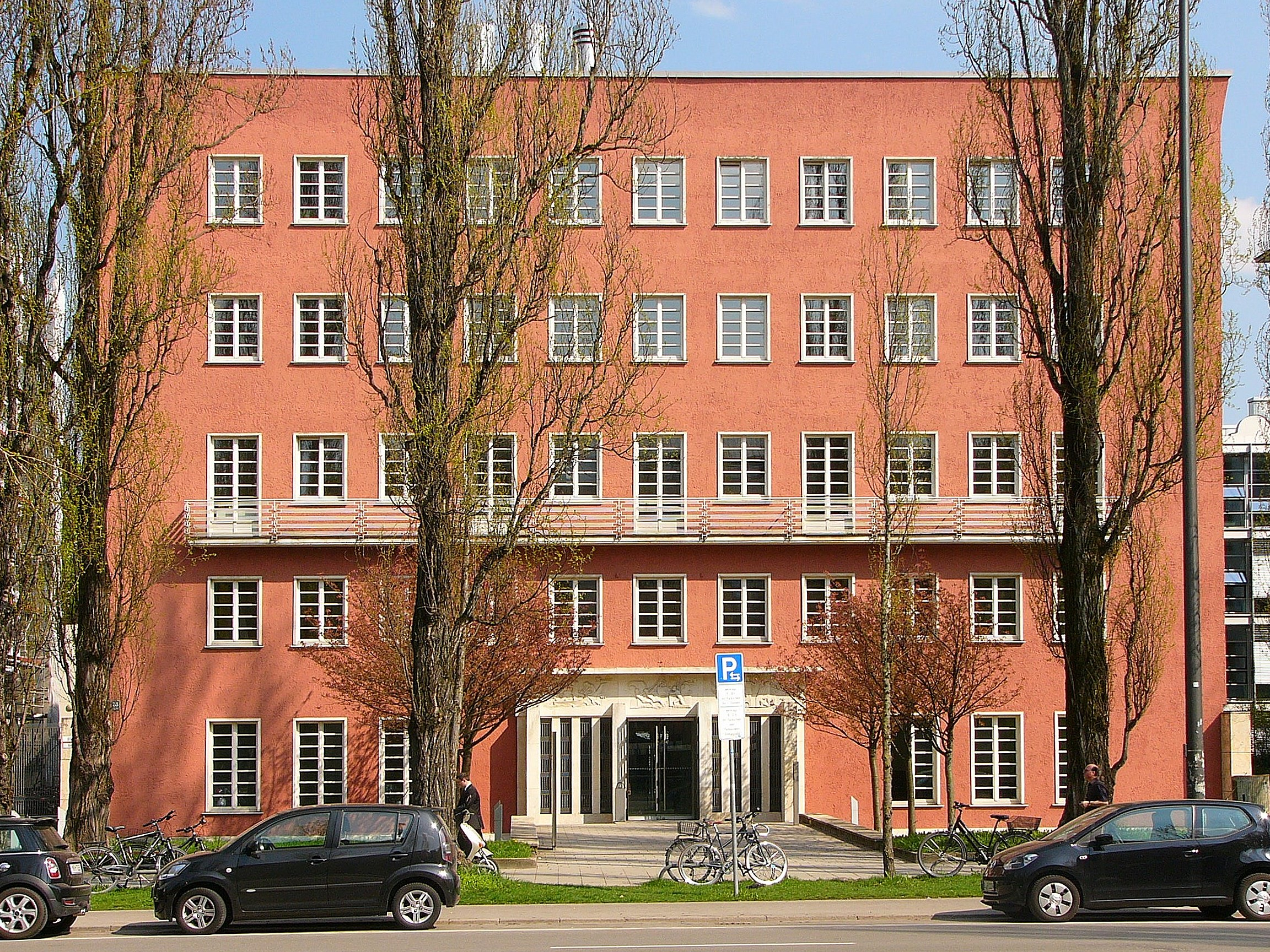 Verwaltungsgebäude; kubischer Block; ein Hauptwerk der Neuen Sachlichkeit in München, 1928–29 von Jakob Pfaller. This is a photograph of an architectural monument.